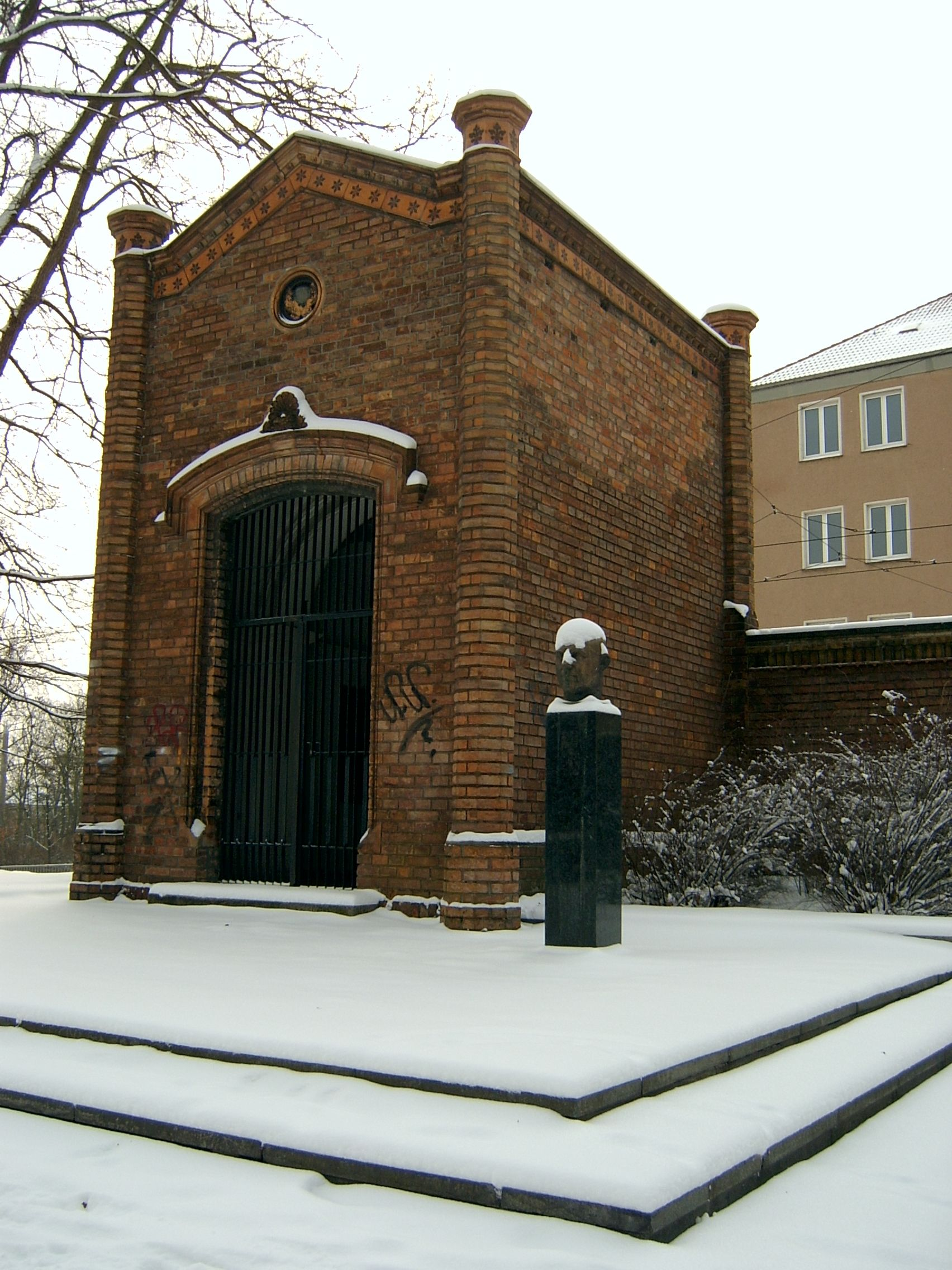 Die Ernst-Thälmann-Gedenkstätte in Frankfurt (Oder) befindet sich am Rande des Kleist-Parks an der Fürstenwalder Straße. Die Gedenkstätte wurde am 15. April 1986, zum 100. Geburtstags Thälmanns eingeweiht. Die Thälmann-Büste wurde vom Bildhauer Walter Kreisel geschaffen. Hinter der Büste befindet sich ein Mausoleum der Familie Otto Stahls[1]